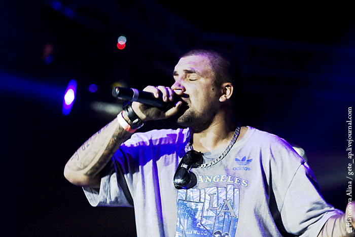 Концерт Гуфа, Смоки Мо и Басты в Ледовом дворце, 19 сентября 2009 года